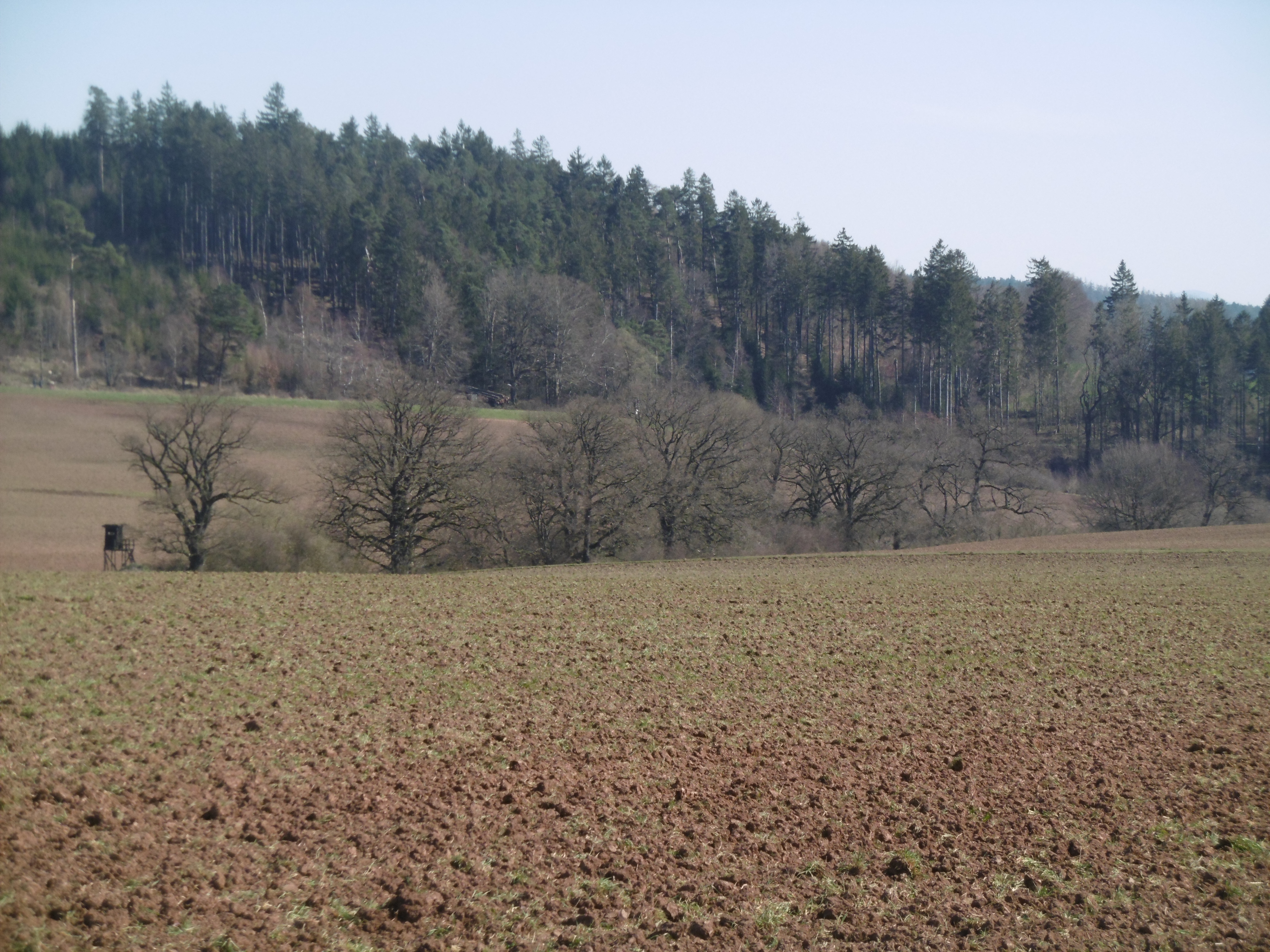 Geschützter Landschaftsbestandteil Krähengrund umgeben vom Acker des Landschaftsschutzgebiet Freiflächen bei Oesdorf / Westheim und Krähengrund.